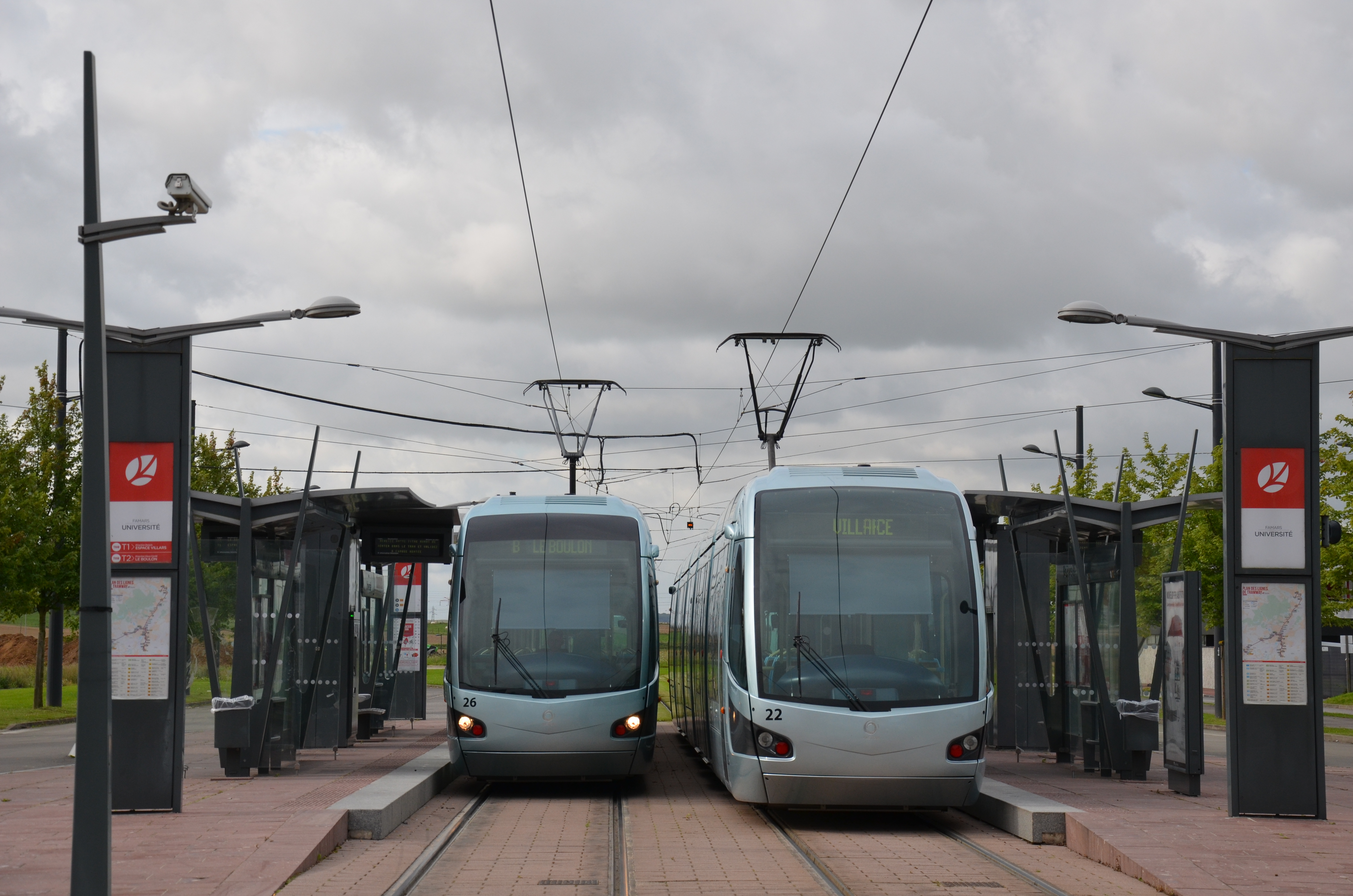 Alstom Citadis 302 n°26 et 22 sur les lignes T1 et T2 du réseau TRANSVILLES de Valenciennes, au terminus Université à Famars.